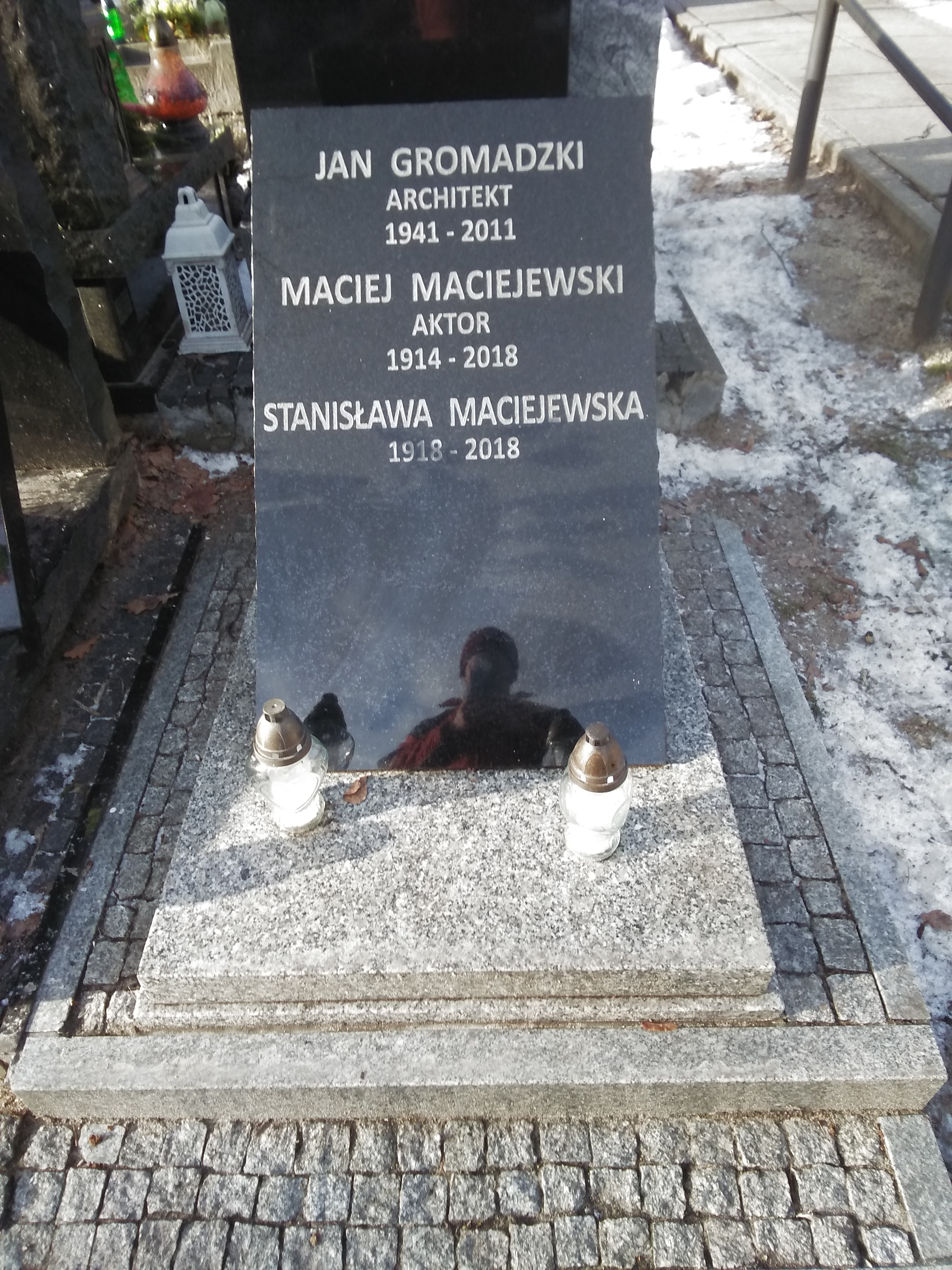 Grób Macieja Maciejewskiego na Cmentarzu Wojskowym na Powązkach